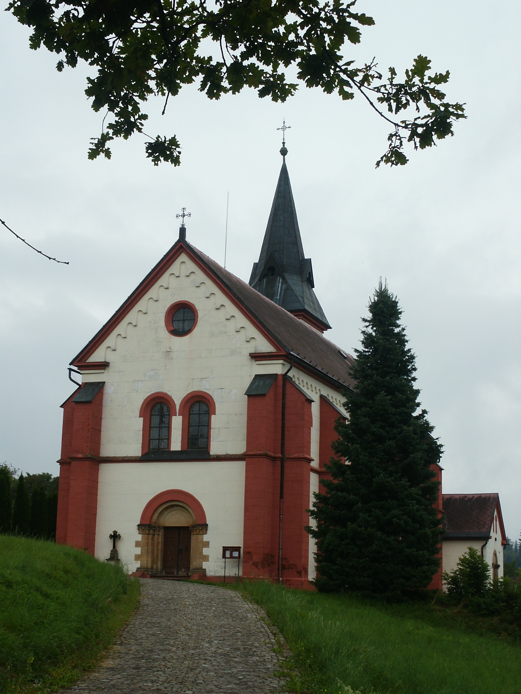 Kostel Andělů strážných, Vidochov